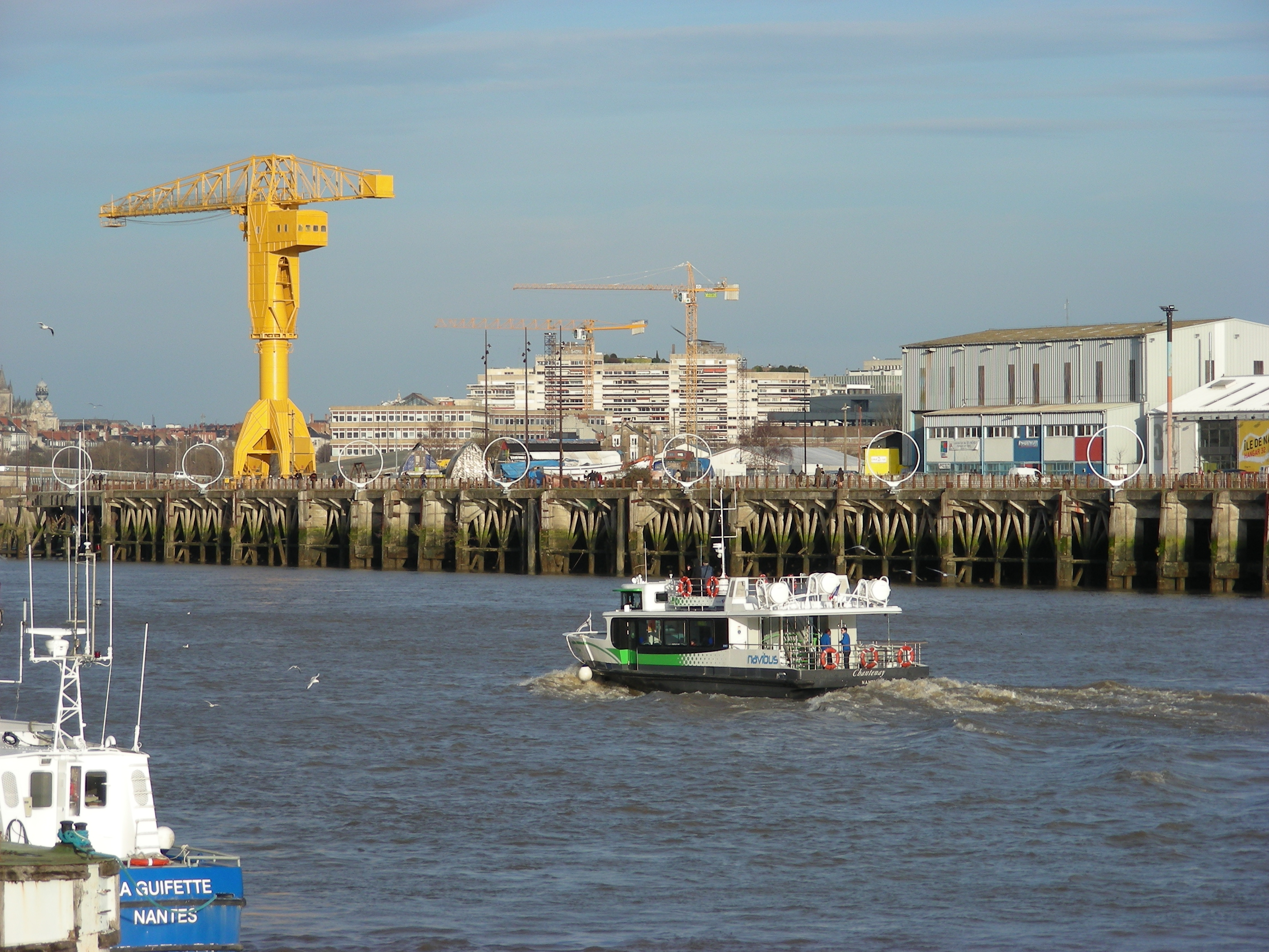 Nantes Grue Jaune et Hangards à Bananes